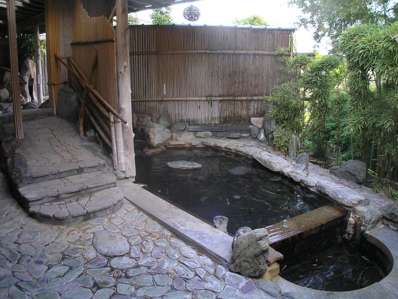 加古川温泉みとろ荘露天風呂（展望風呂）